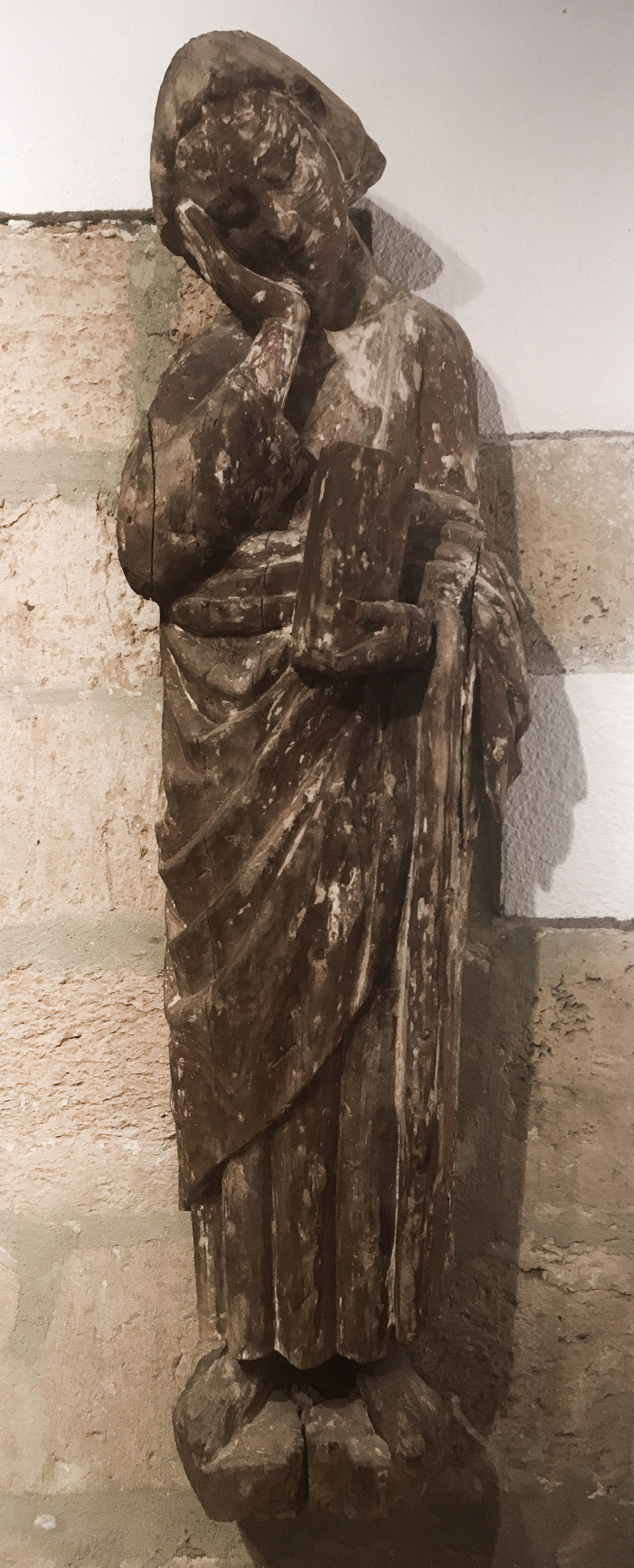 Talla de madera de San Juan Bautista encontrado en el osario de la parroquia